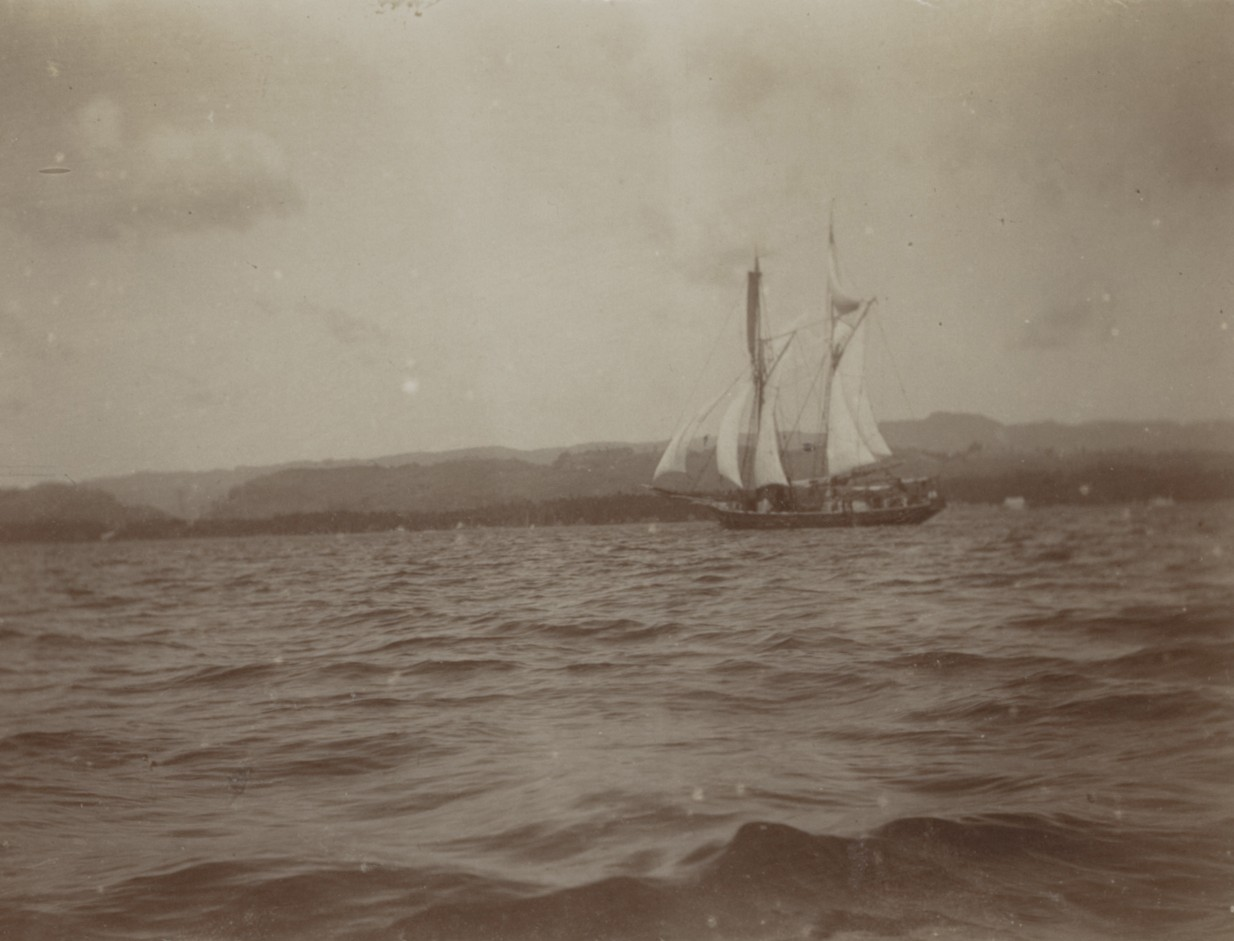 Academische Collecties: 1899-1900, Siboga-expeditie naar Nederlands Oost-Indië, onder leiding van Max Wilhelm Carl Weber Max Weber en J. Versluys maakten tijdens hun verblijf op Saleyer gebruik van de kruisprauw om in de ondiepe wateren rondom de eilandjes koralen te verzamelen.